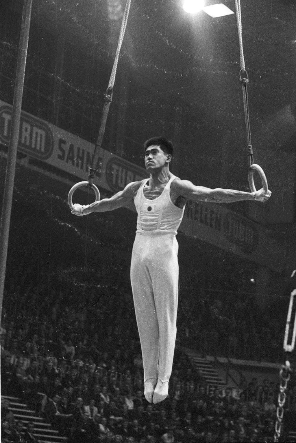 Turner Yukio Endo aus Japan bei seiner Übung an den Ringen.